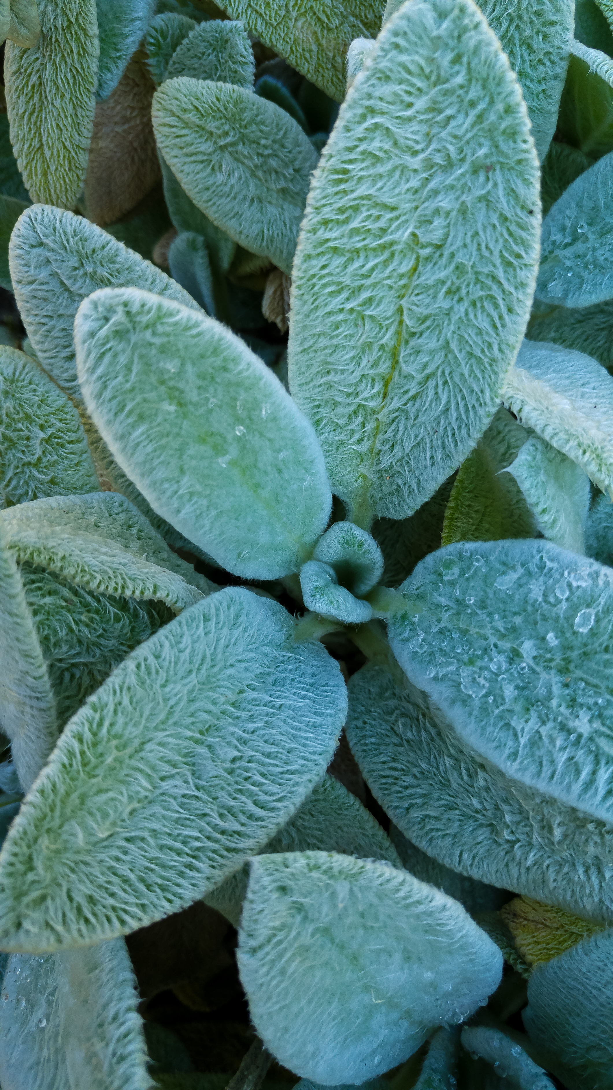 Woll-Ziest, Wollziest 'Silver Carpet', Eselsohren, lat. Stachys byzantina (lanata)